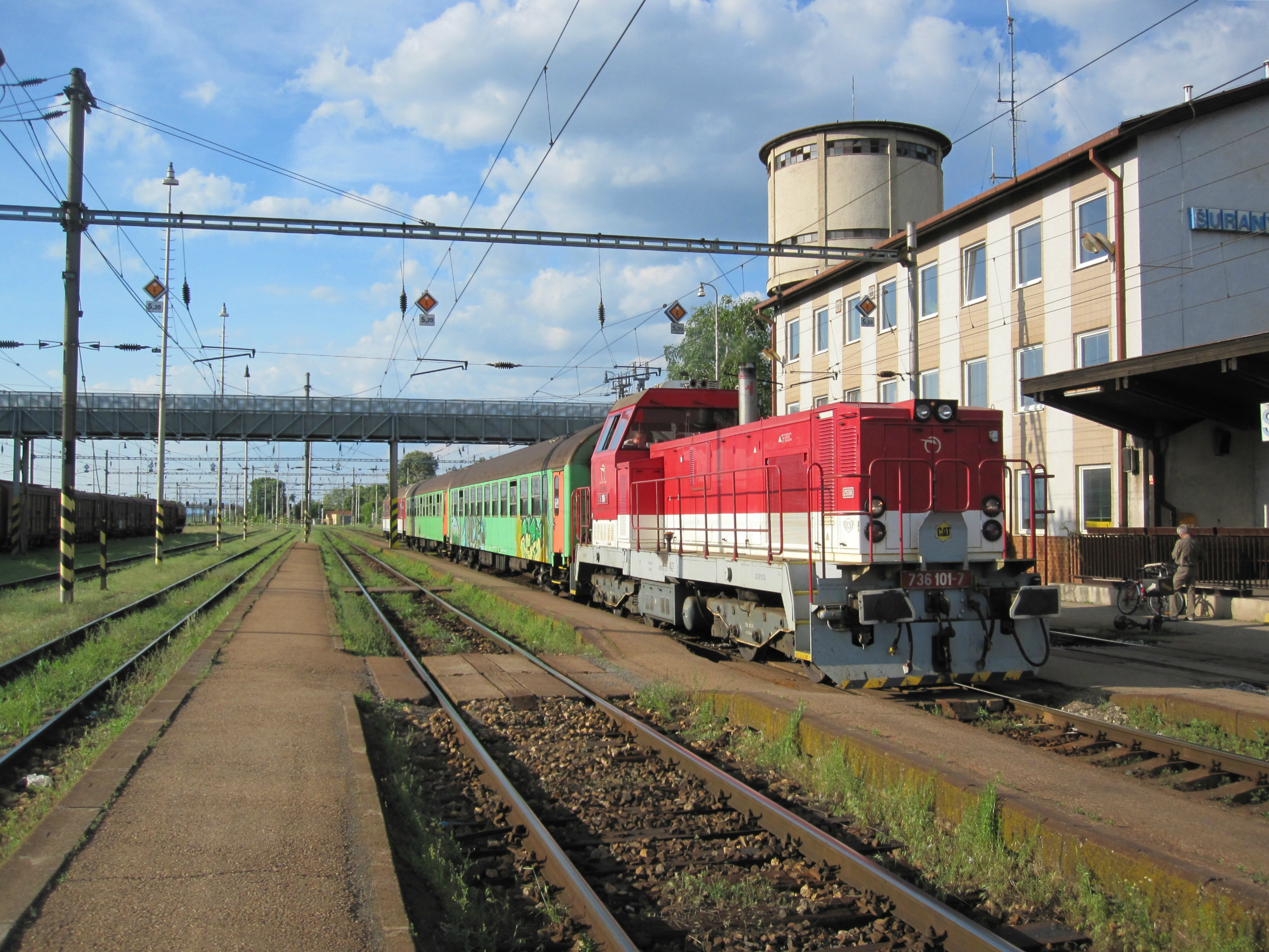 Vlak Železniční společnosti Slovensko s motorovou lokomotivou 736.101, Šurany